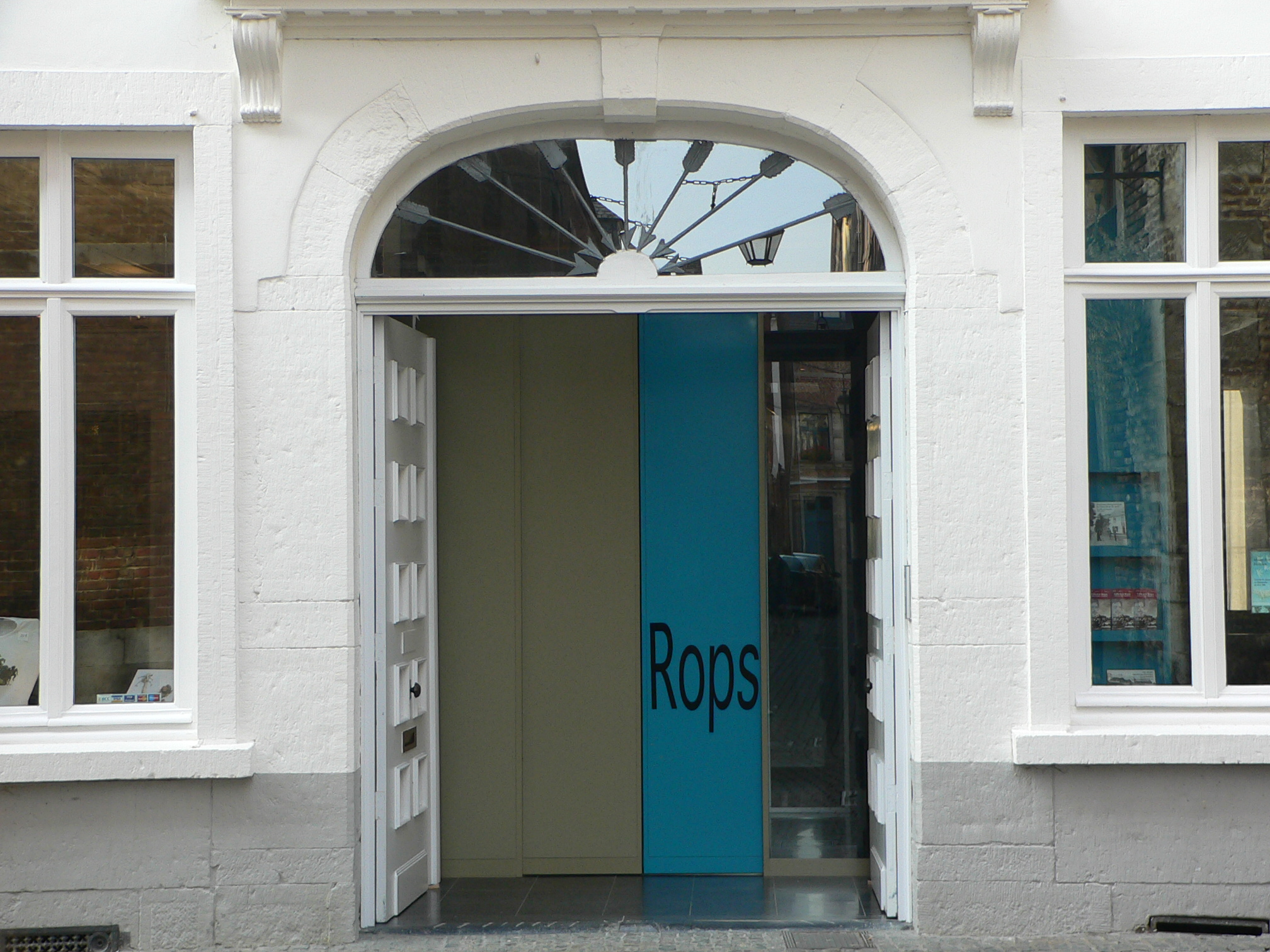 Musée Félicien Rops Photo personnelle de Poulsen, auteur de cette photo, la met en disposition libre.